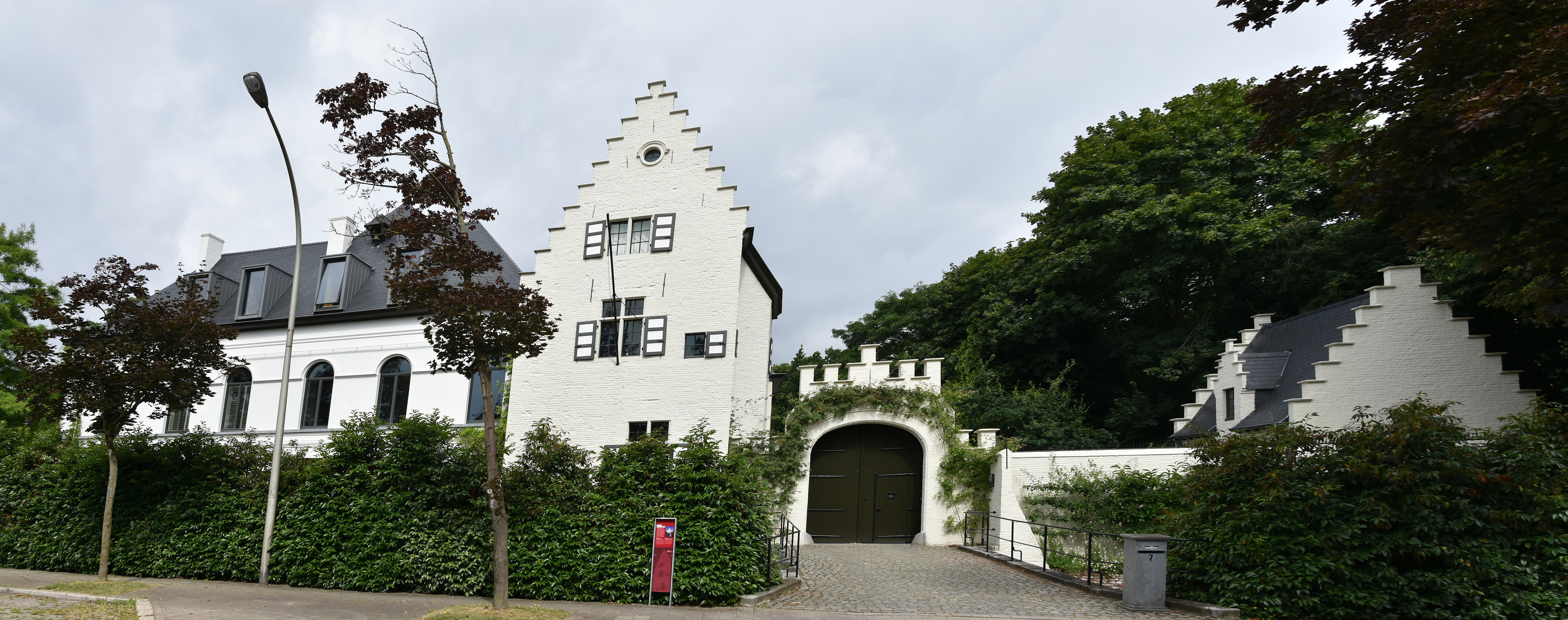 Kasteel de Oude Kluis te Gentbrugge, België